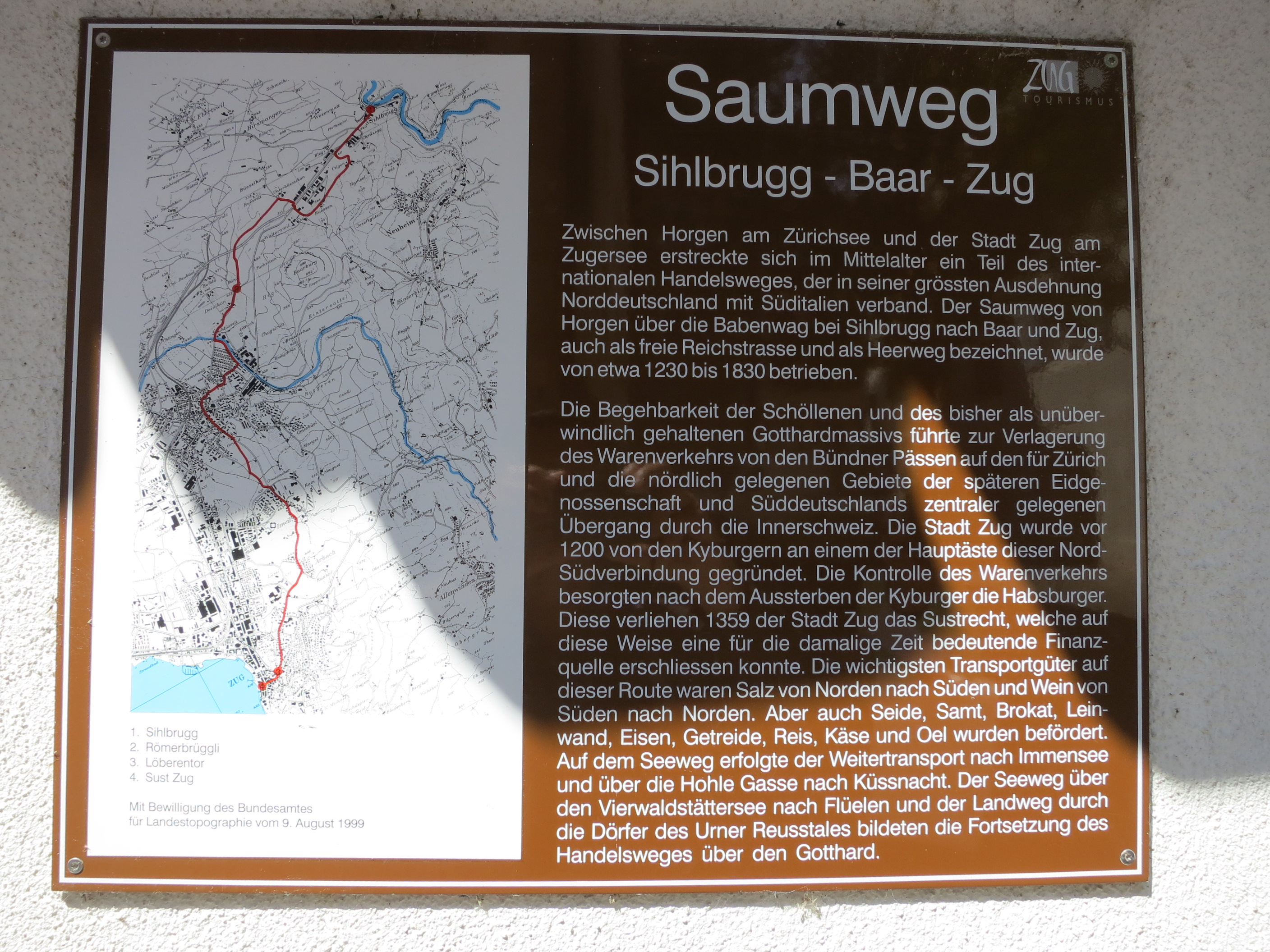 Saumpfad, Zug ZG, Schweiz